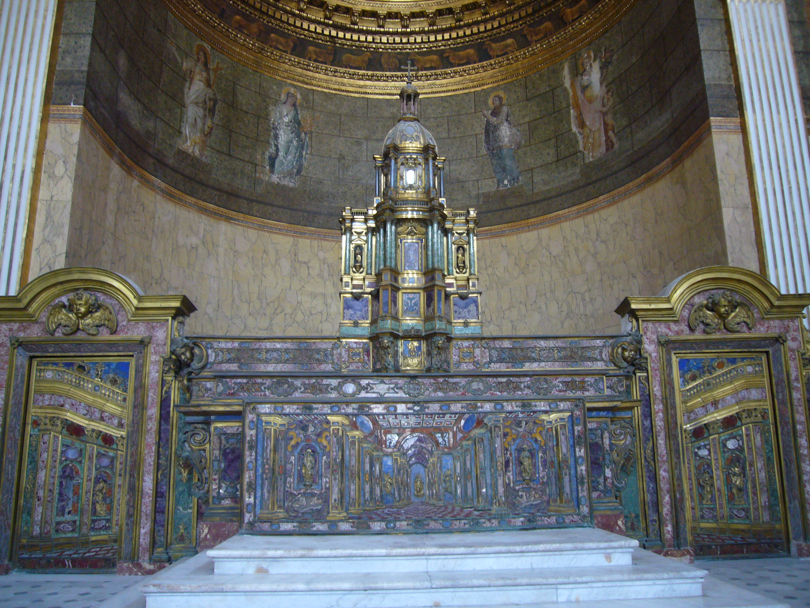 Raffinatissimo altare maggiore nella Cappella Reale del Palazzo Reale di Napoli, eseguito da Dionisio Lazzari nel 1672. E' affiancato da due porte laterali (del 1691) ed un ciborio (del 1772), tutti realizzati ad intarsi di pietre dure policrome e lapislazzuli (che nel paliotto e nelle porte creano sorprendenti effetti prospettici) e rifiniture in bronzo dorato. Collocato originariamente nella chiesa di Santa Teresa degli Scalzi a Napoli, per il suo splendore e la sua preziosità venne trasferito nel 1808 (a seguito della soppressione degli ordini religiosi) nella cappella del Palazzo Reale di Napoli dove tuttora si trova.